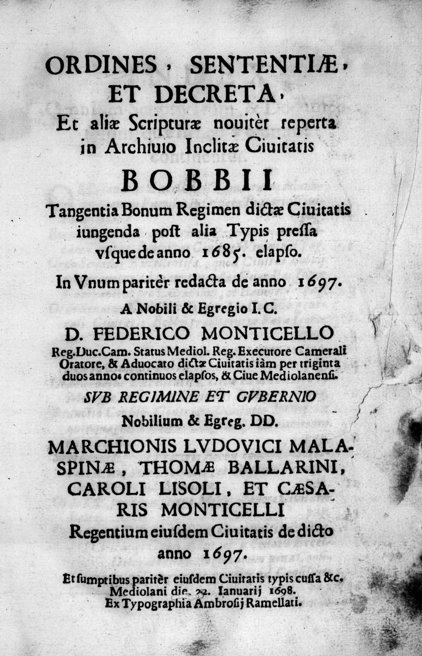 Frontespizio